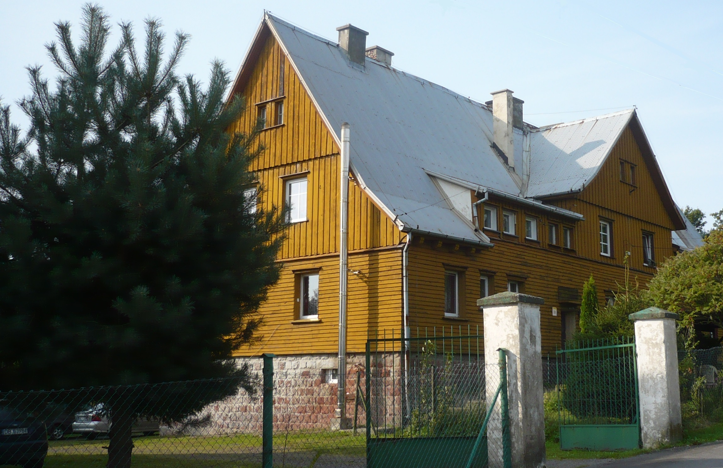 Bartnica. Strażnica